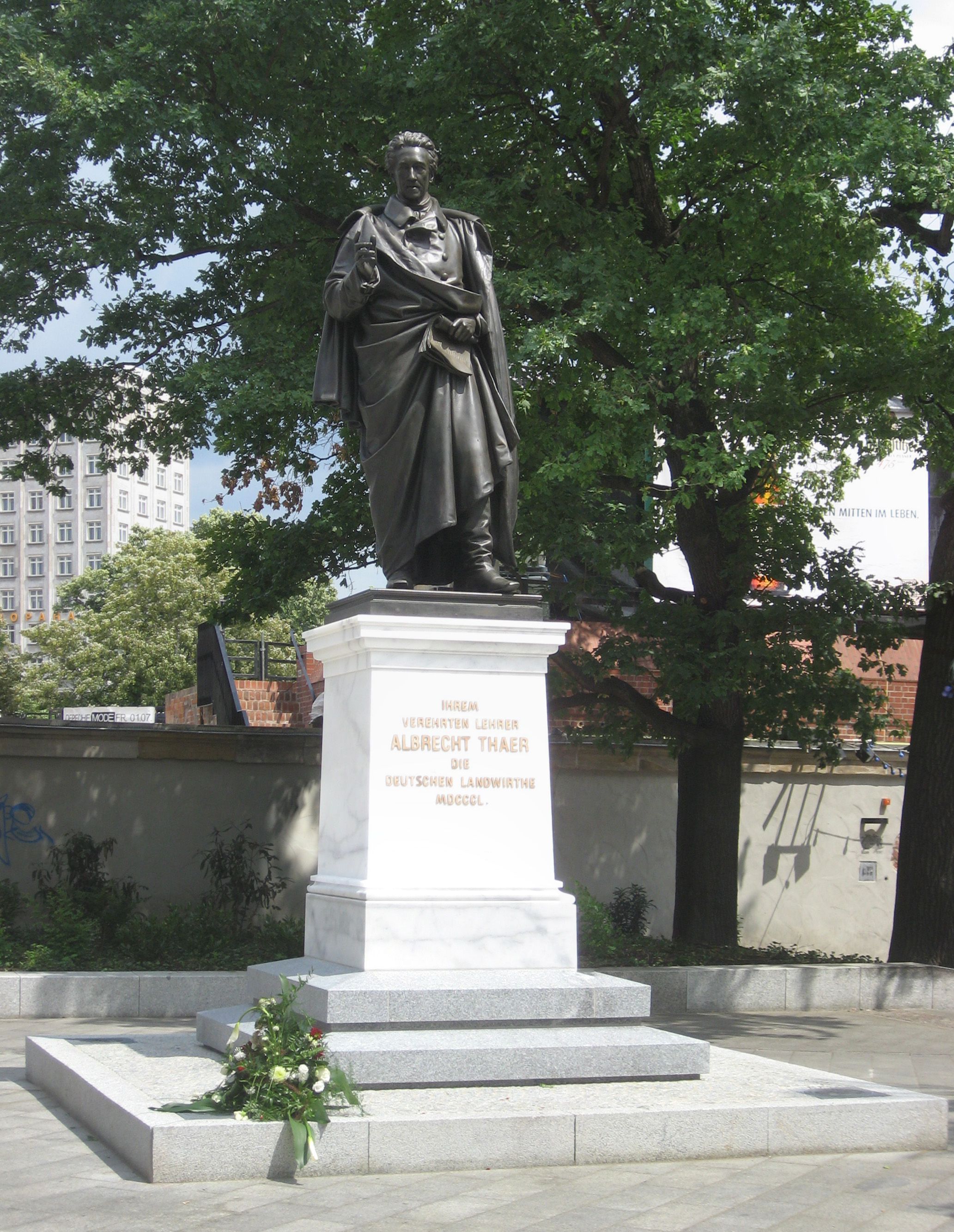 Denkmal für Albrecht Daniel Thaer in Leipzig, Lenné-Anlage Moritzbastei/Schillerstraße1850 geschaffen von Ernst Rietschel1859 aufgestellt vor dem Westflügel der damaligen Bürgerschule, 1947 ohne Sockel auf das Universitätsgelände Liebigstraße umgesetzt, 2009 restauriert, 2011 historischer Sockel mit Stufenanlage wiederhergestellt und am ursprünglichen Standort wiedereingeweiht am 24. Juni 2011